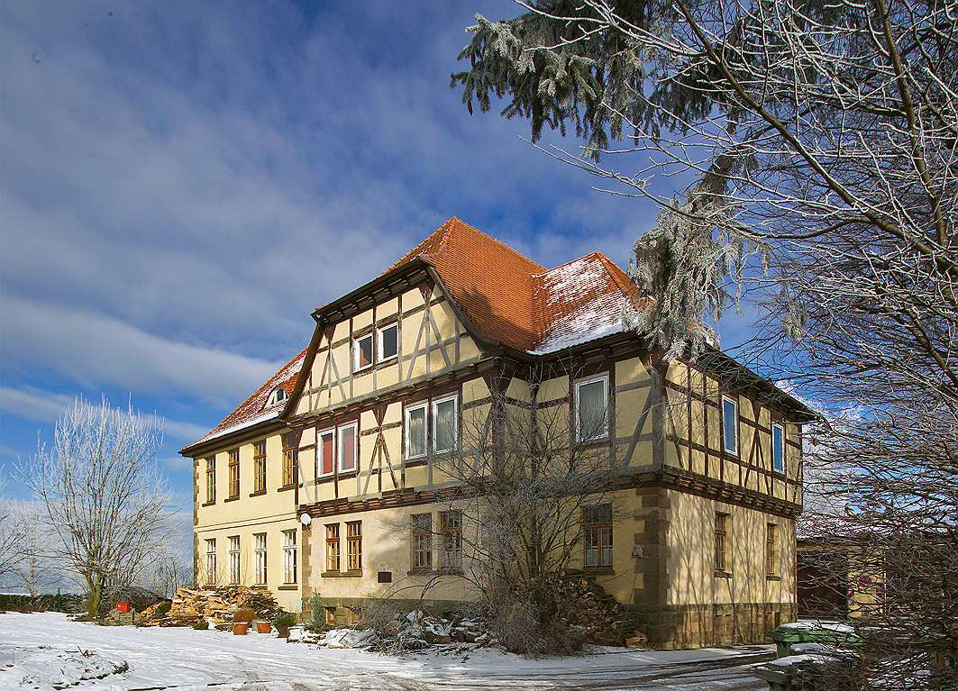 Die ehemalige alte Schule in Meimbressen, heute Privatbesitz.